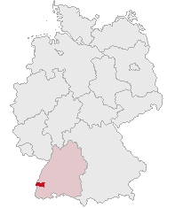 Landkreis Emmendingen, Baden-Württemberg, Germany